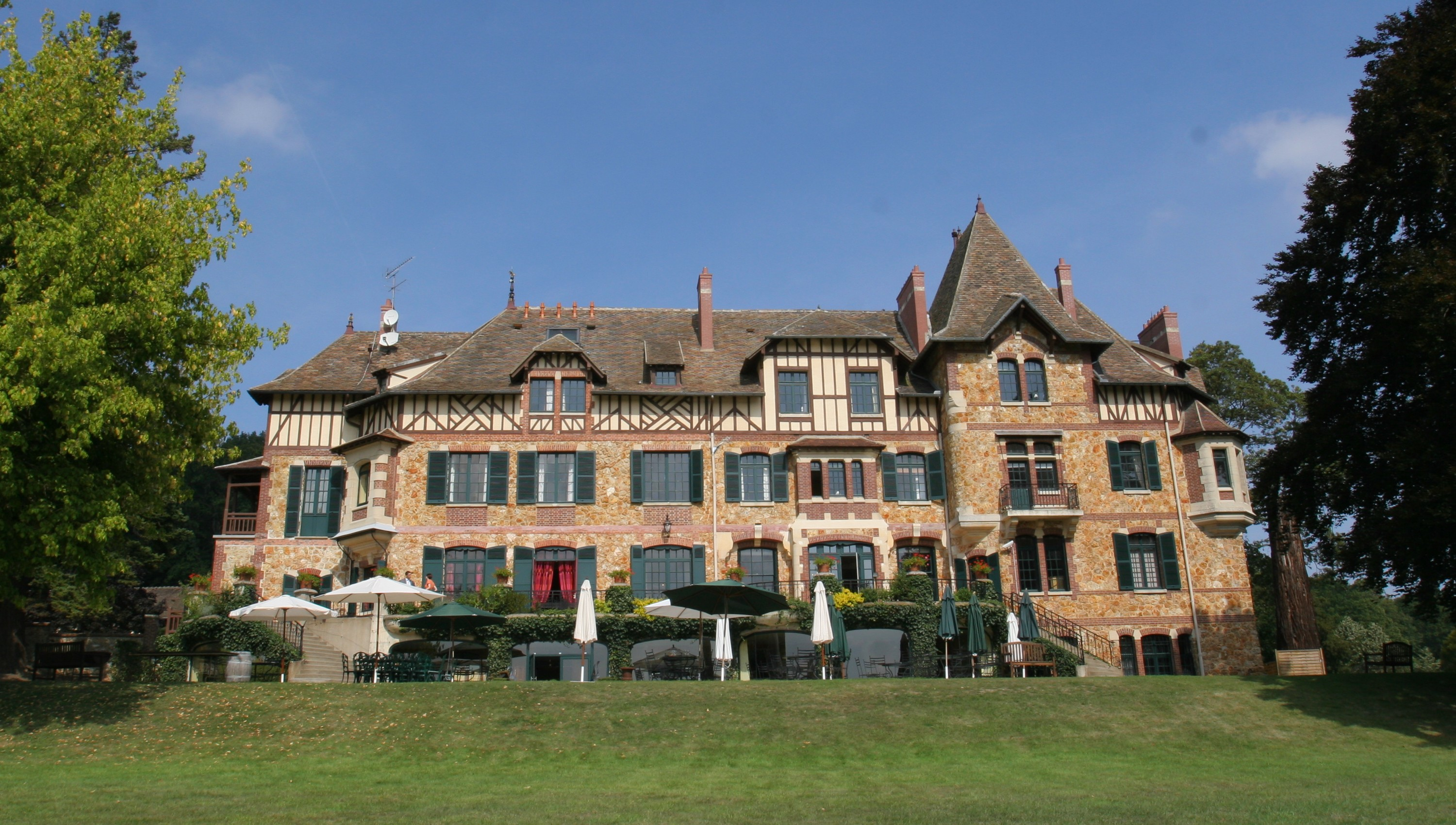 Facade extérieure du château de Romainville